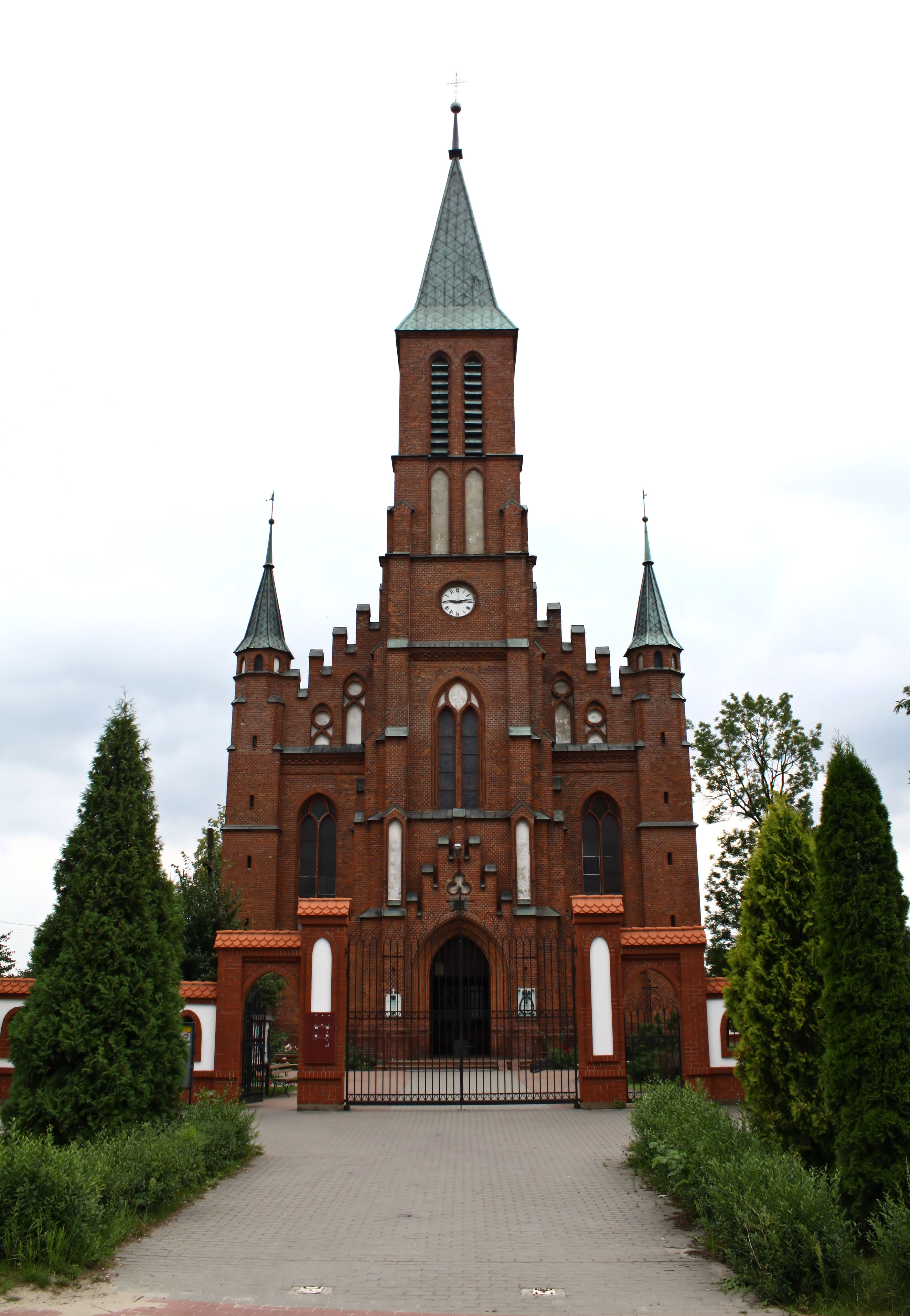 Dębe Wielkie, ul. Warszawska 75 - kościół parafialny p.w. śś. Piotra i Pawła, 1906 (zabytek nr A-306 z 29.12.1983)